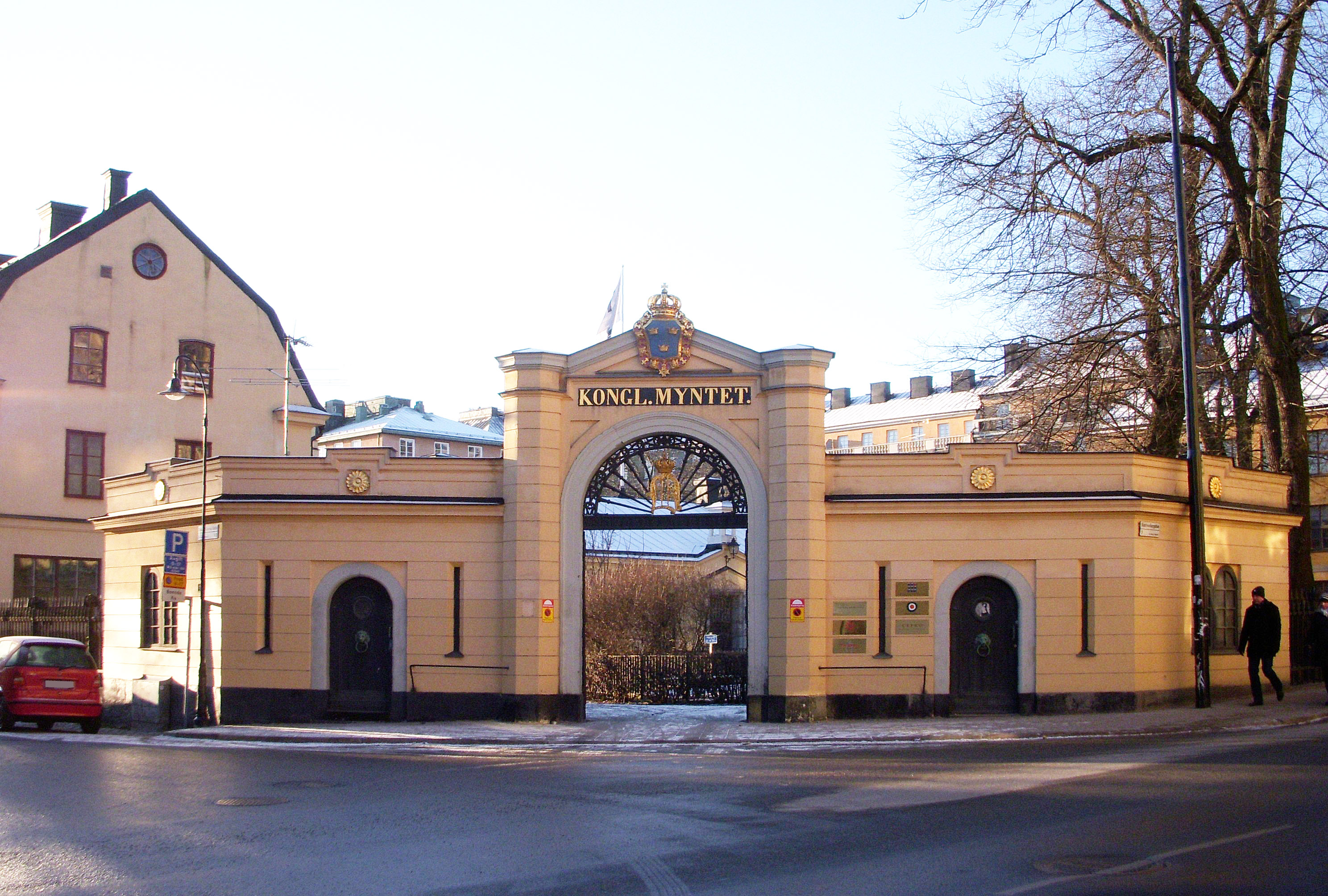 Kungliga Myntet i Stockholm, Kungsholmen